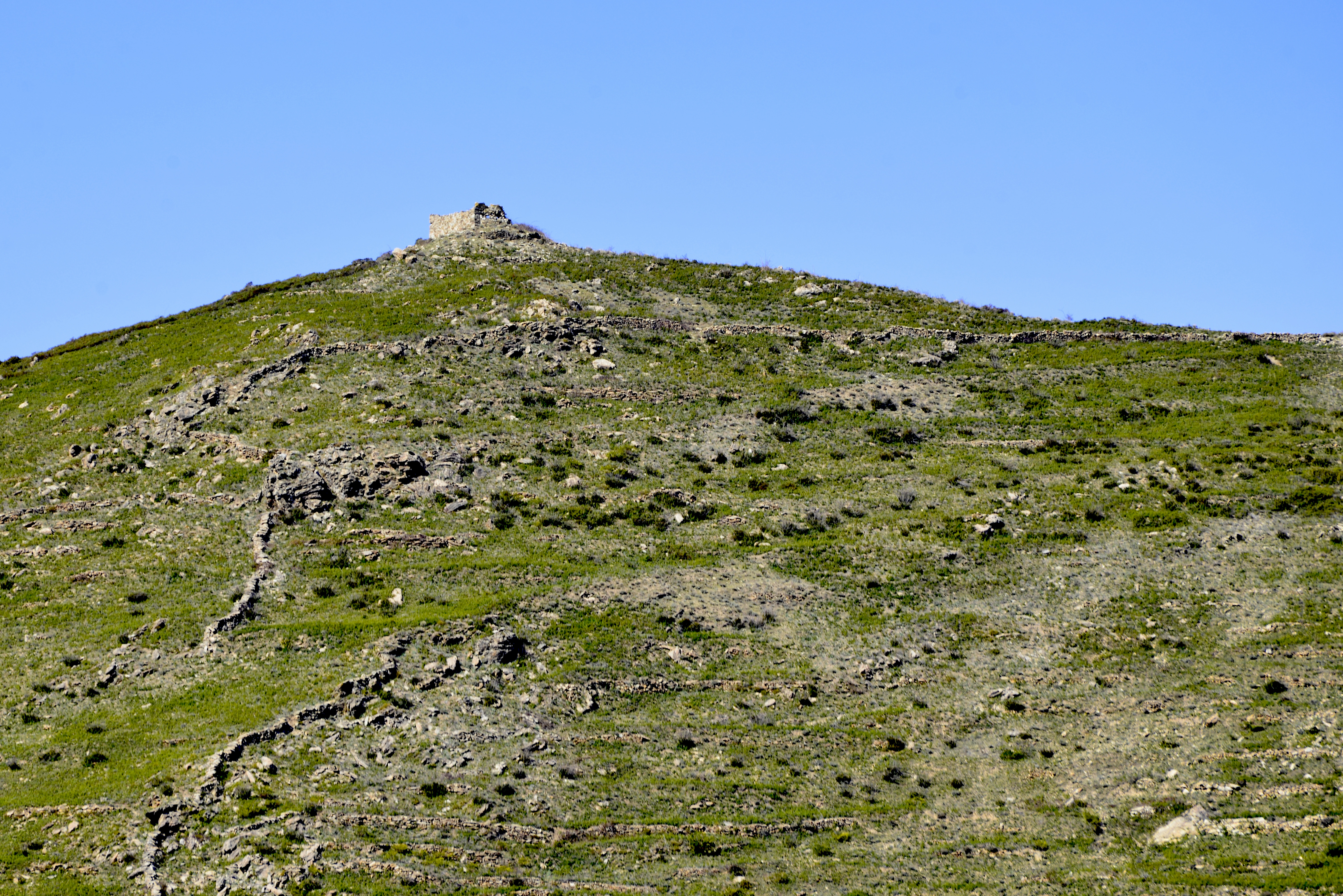 Santa-Lucia-di-Mercurio, Bozio (Haute-Corse) - Ruines de la chapelle rurale Santa Servanda située à 1043 mètres d'altitude au nord du village. Présence de nombreuses terrasses de culture.